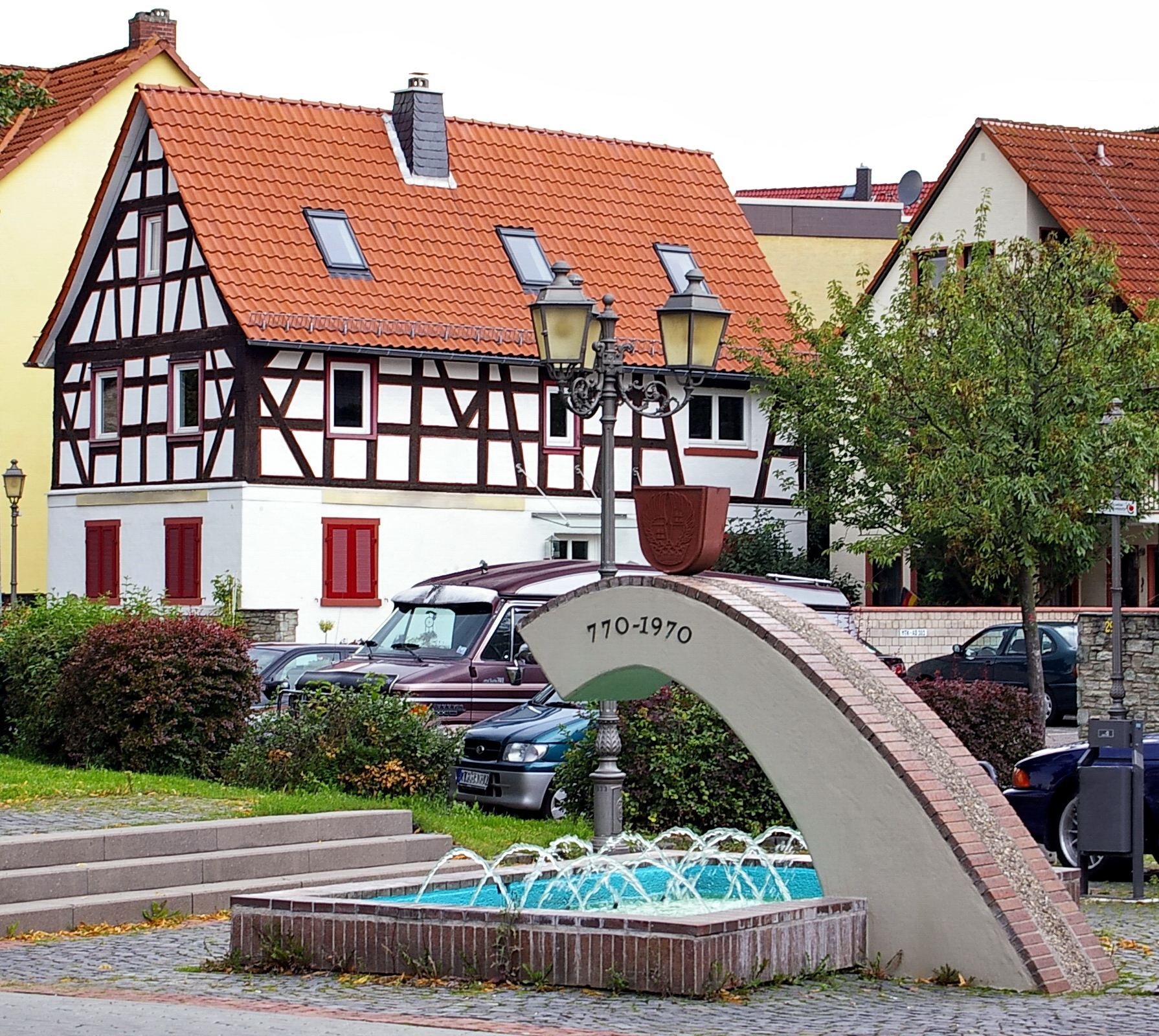 Brunnen an der Hauptstraße in Eschborn am Taunus